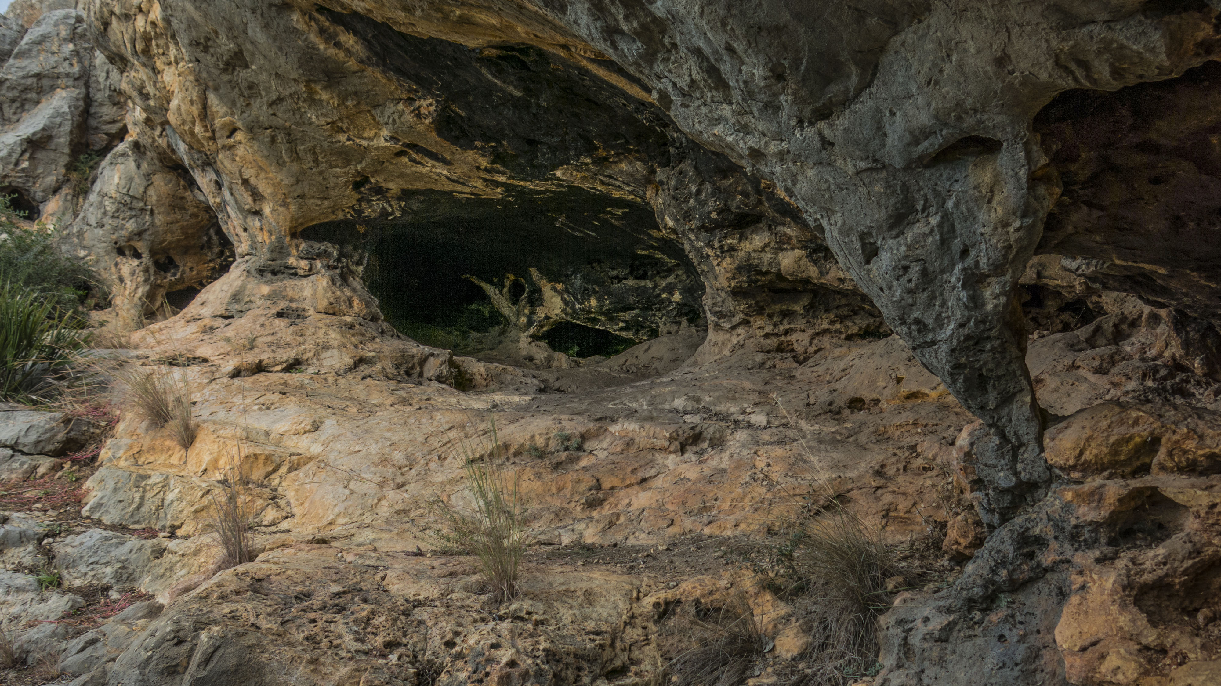 Situada al Parc Natural de les Coves del Truig de la Ribera Alta, dins del terme de Benimodo, al País Valencià.